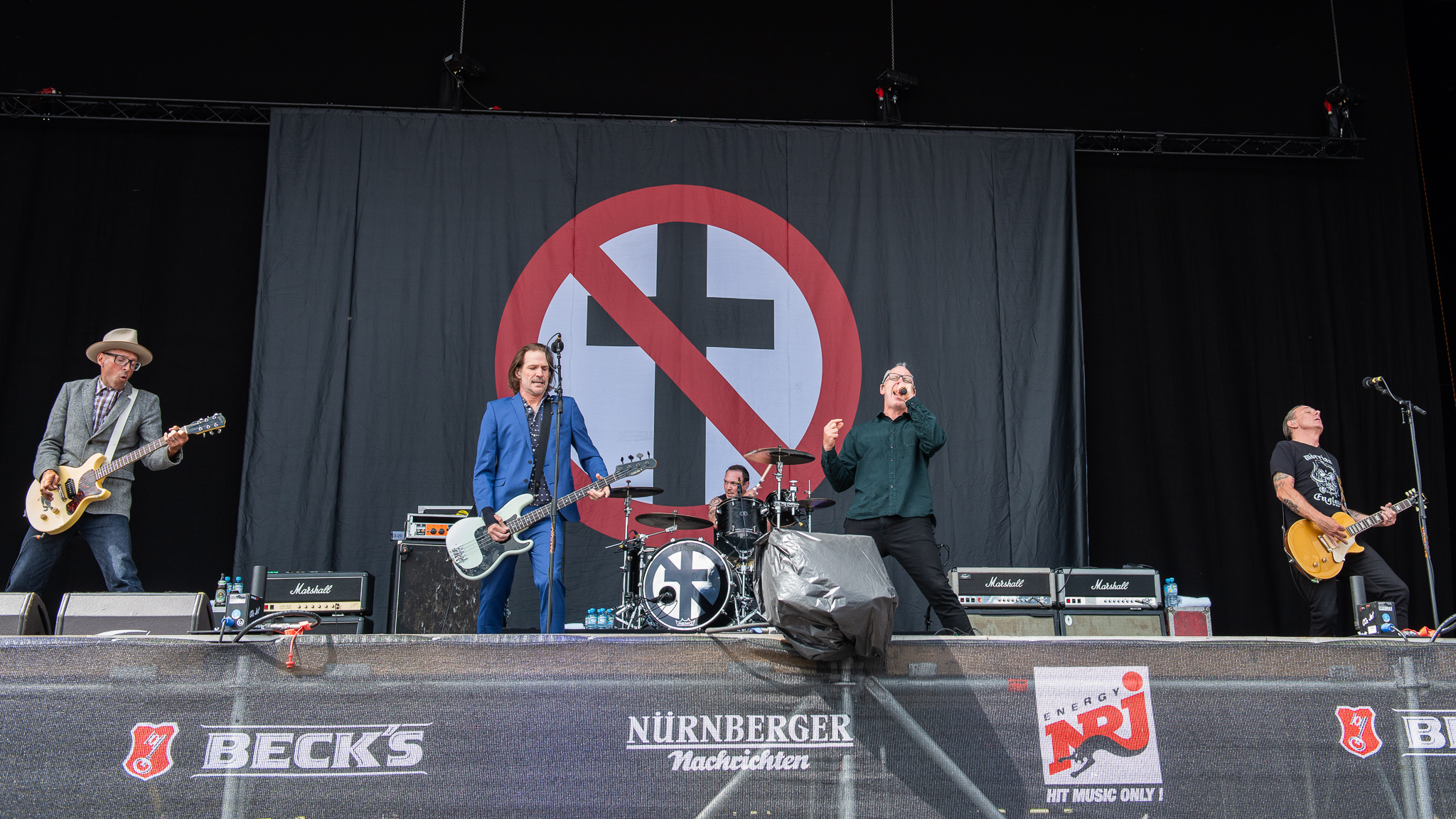 ARGO-Konzerte,Bad Religion,Brett Gurewitz,Brian Baker,Festival,Greg Graffin,Jamie Miller,Jay Bentley,Konzert,Livekonzert,Livemusik,Musik,RiP,Rock im Park 2018,Zeppelin Stage